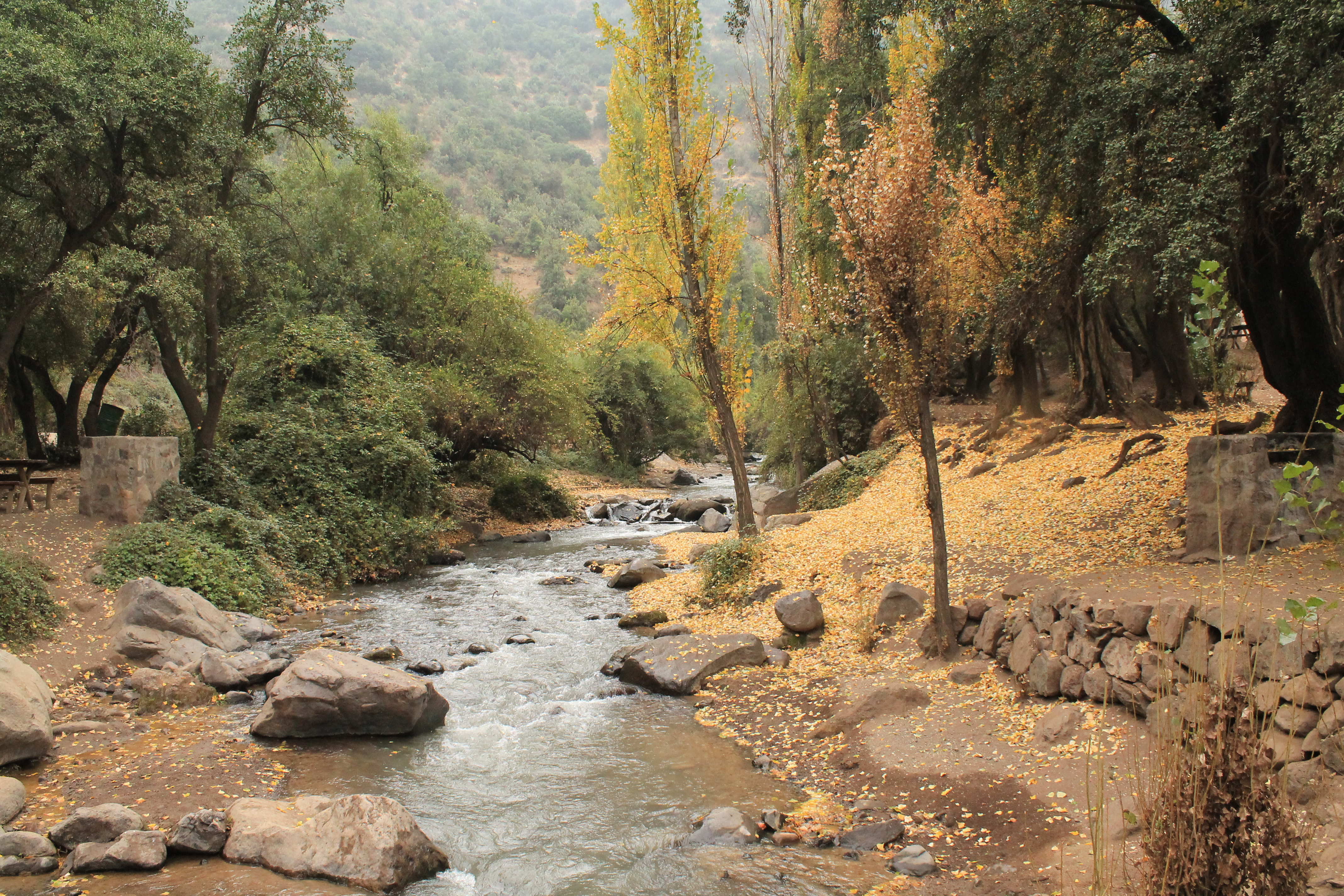 estero el Arrayán, Santuario de la Naturaleza por wariors42